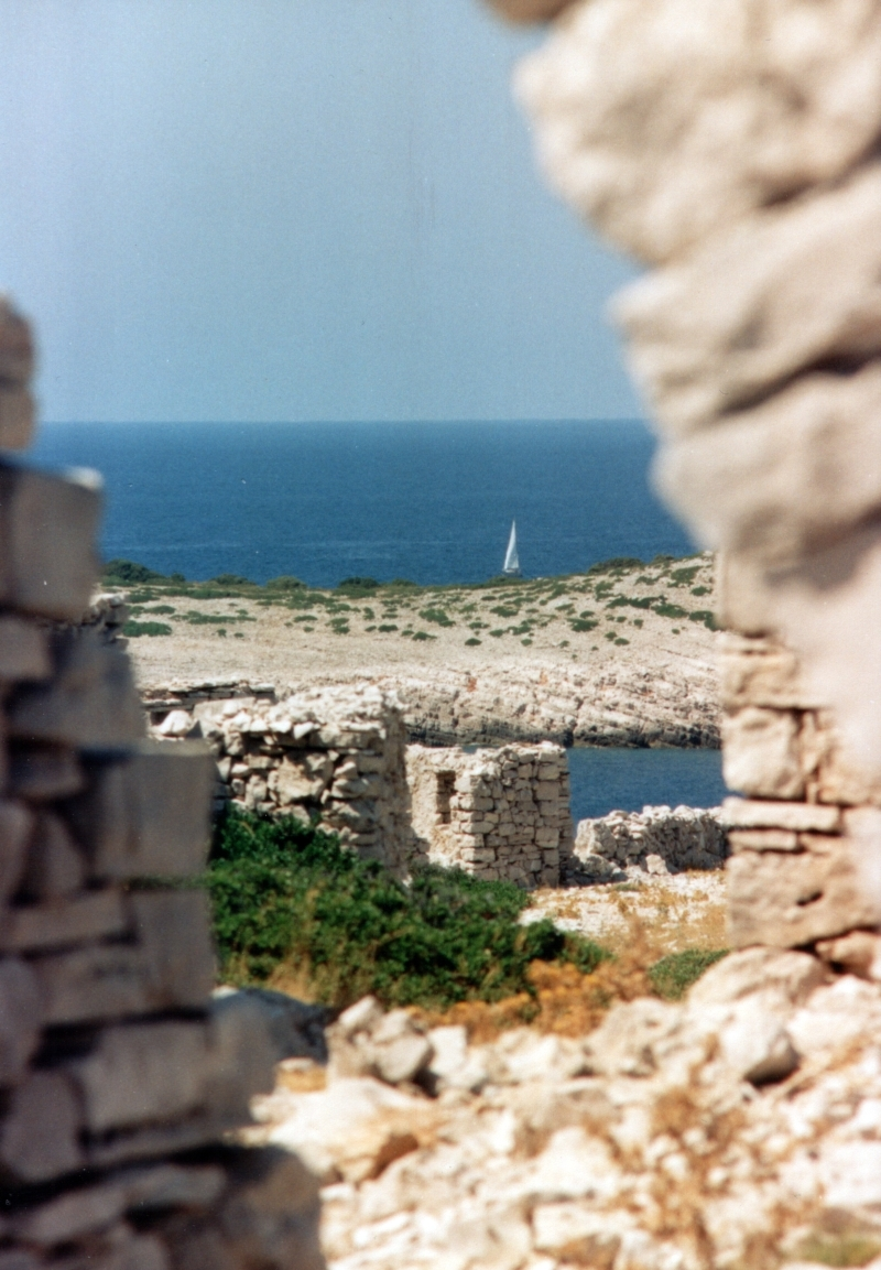 Mana, Kornati, Croatia